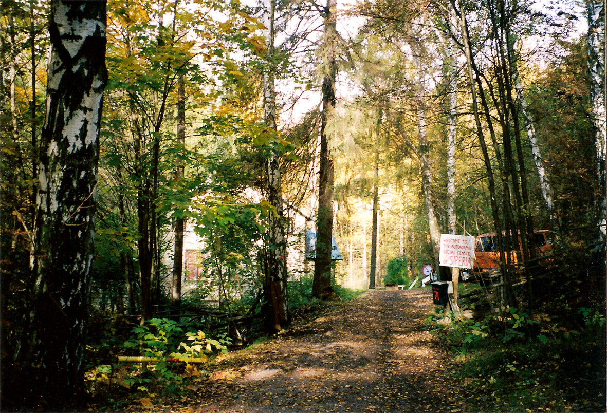 Siperia